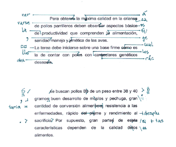 Ejemplo de galera, corrección de estilo.